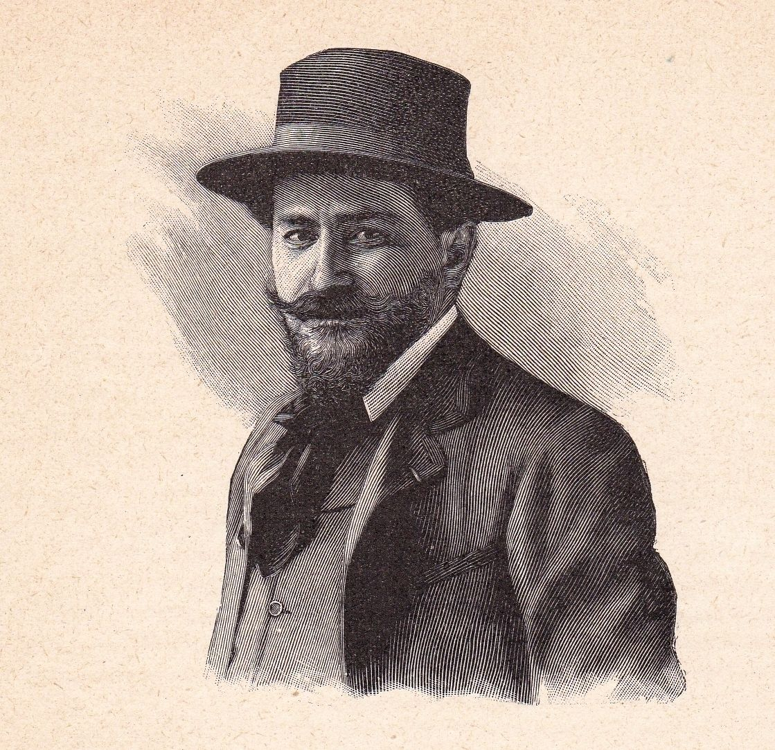 Portrait du peintre Jules Adler